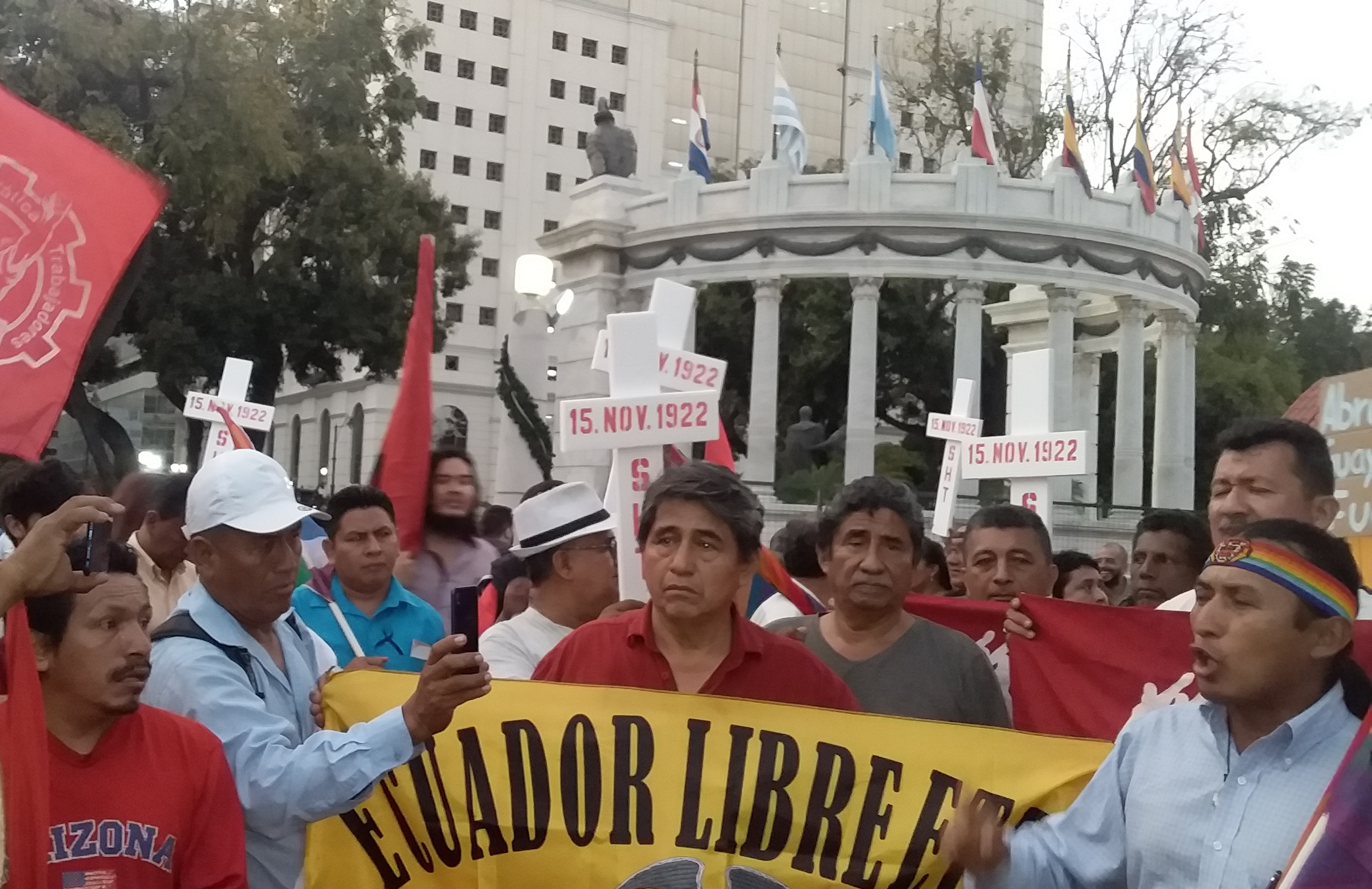 Marcha en Homenaje a la Huelga General y Masacre del 15 de Noviembre de 1922